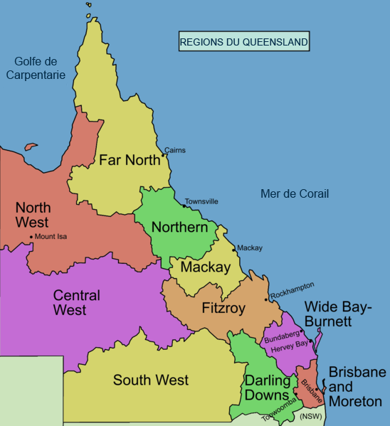 Carte francisée des régions du Queensland en Australie